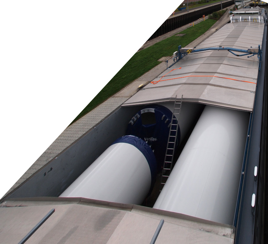 Teile einer Windkraftanlage werden in einem Binnenschiff transportiert.